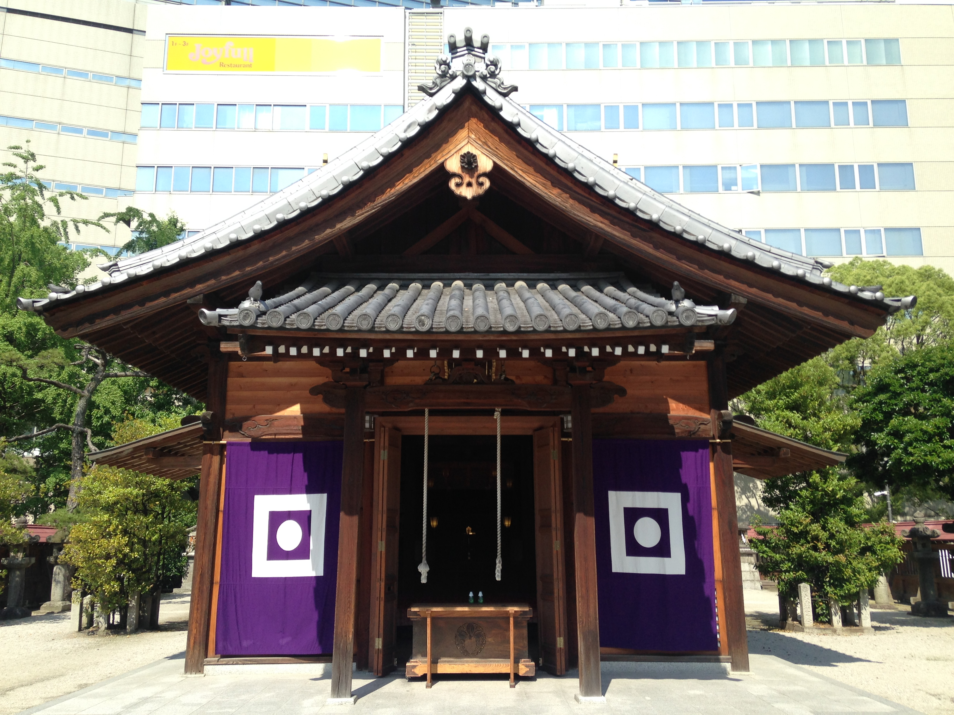 警固神社の拝殿